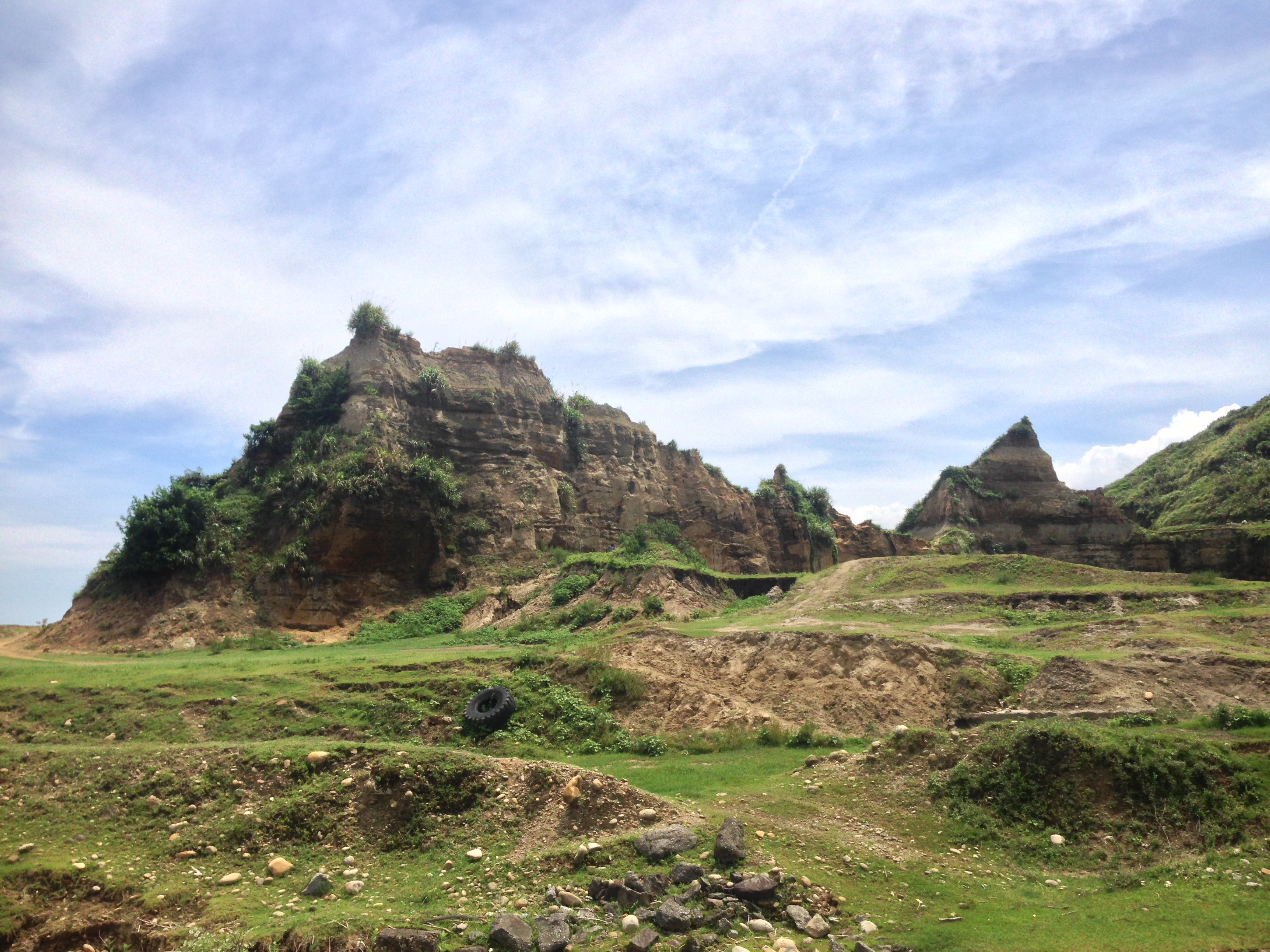 中文（台灣）: 林口大峽谷一景